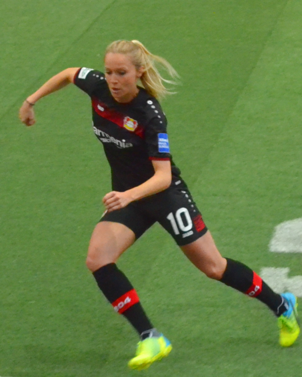 Turid Knaak (Bayer Leverkusen) beim SAP Frauen-FußballCup 2017